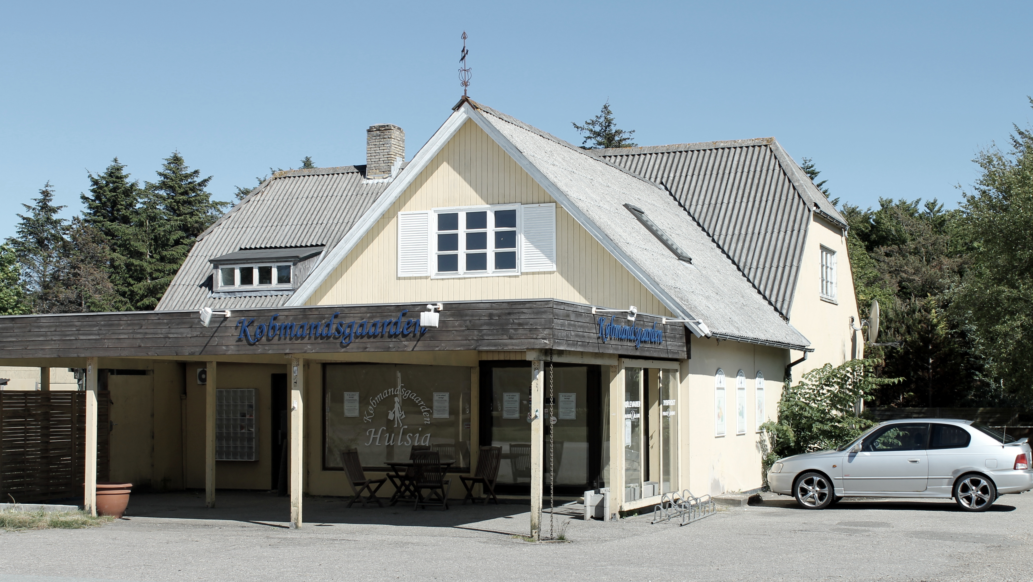 Hulsig. Købmandsgården. Gl. station